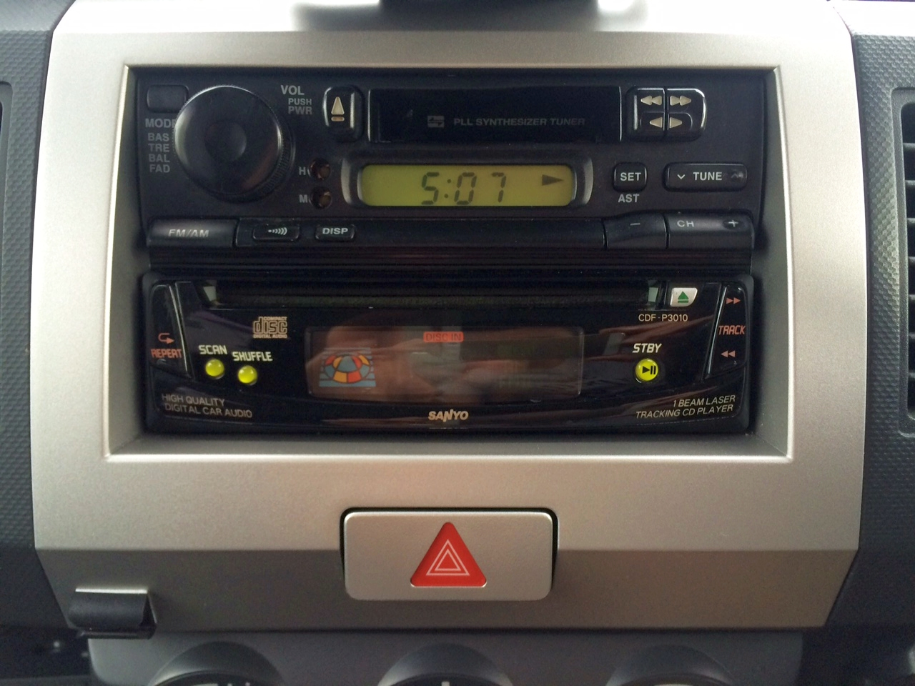 所有する車のカーステレオです。スズキ新カプラーに繋げられる変換ハーネス使用。 車はAZワゴン(MJ21S) カセットチューナーアンプはスズキ純正。20W×4ほど？ 純正型番 39101-76G30 CDプレーヤーは三洋電機製。基本的にはスズキ純正。 型番 CDF-P3010 純正型番 99000-79H89